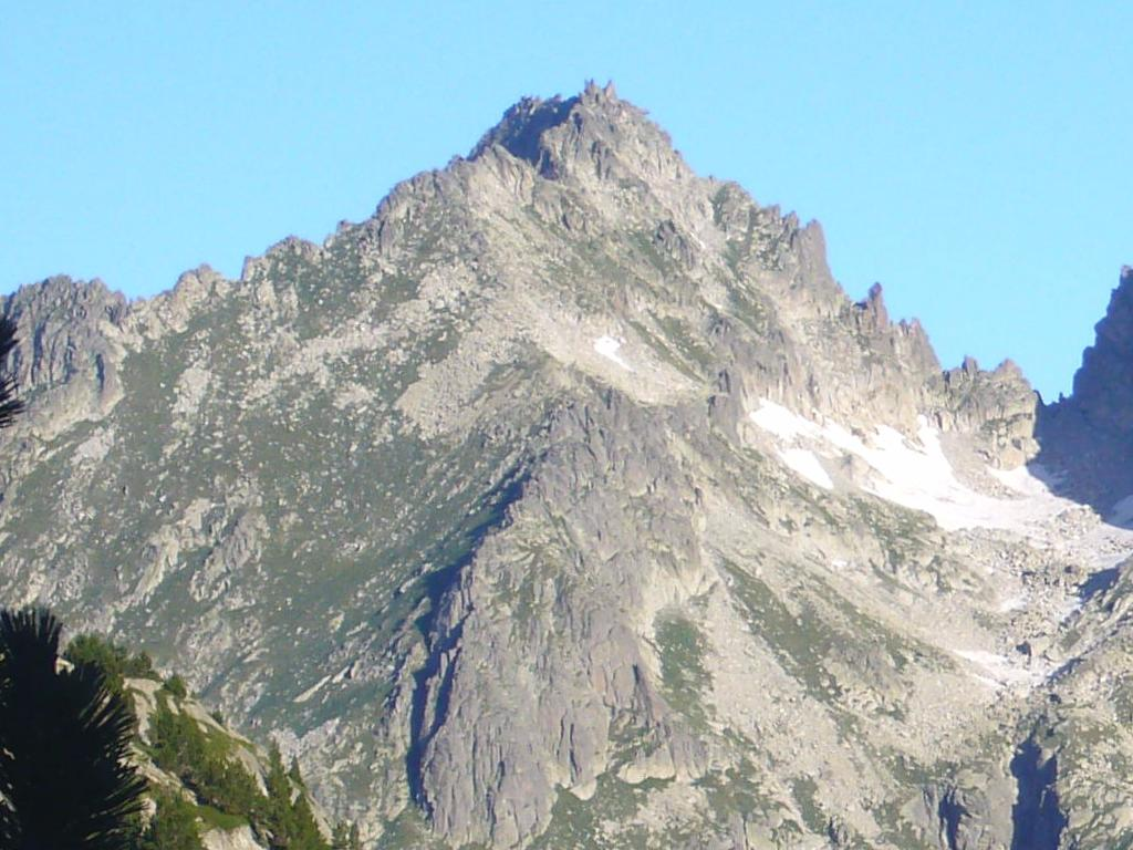 Punta d'Harlé vista des de la Vall de Colieto; la Vall de Boí, Alta Ribagorça, Catalunya